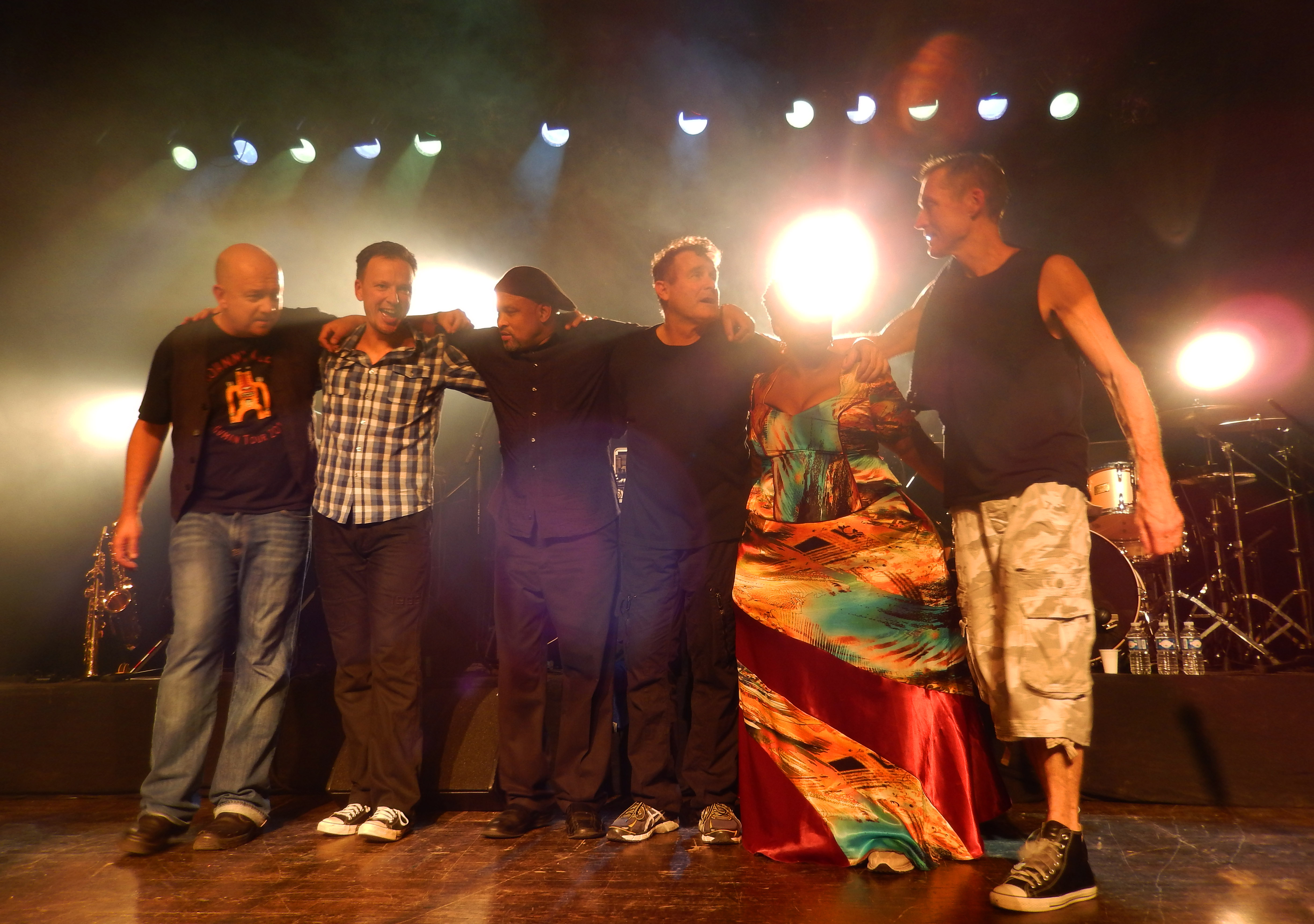 Johnny Clegg Alençon 2013